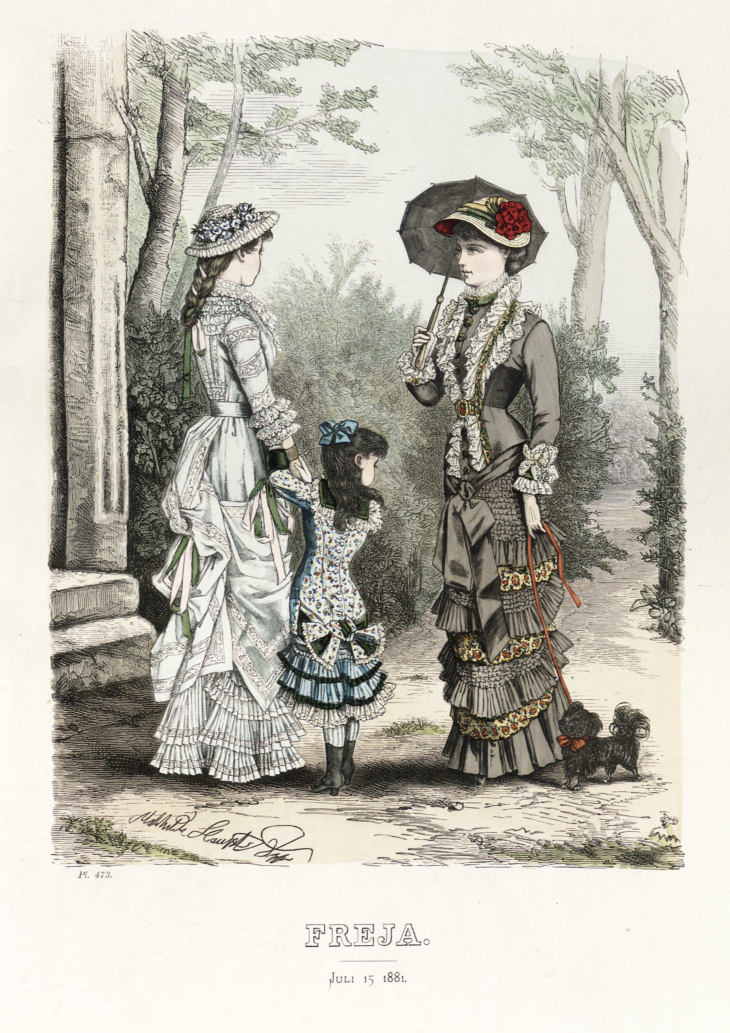 Klänning; Hatt; Blommor; Flätor; Frisyr; Band; Pantalonger; Promenadklänning; Parasoll; Hund